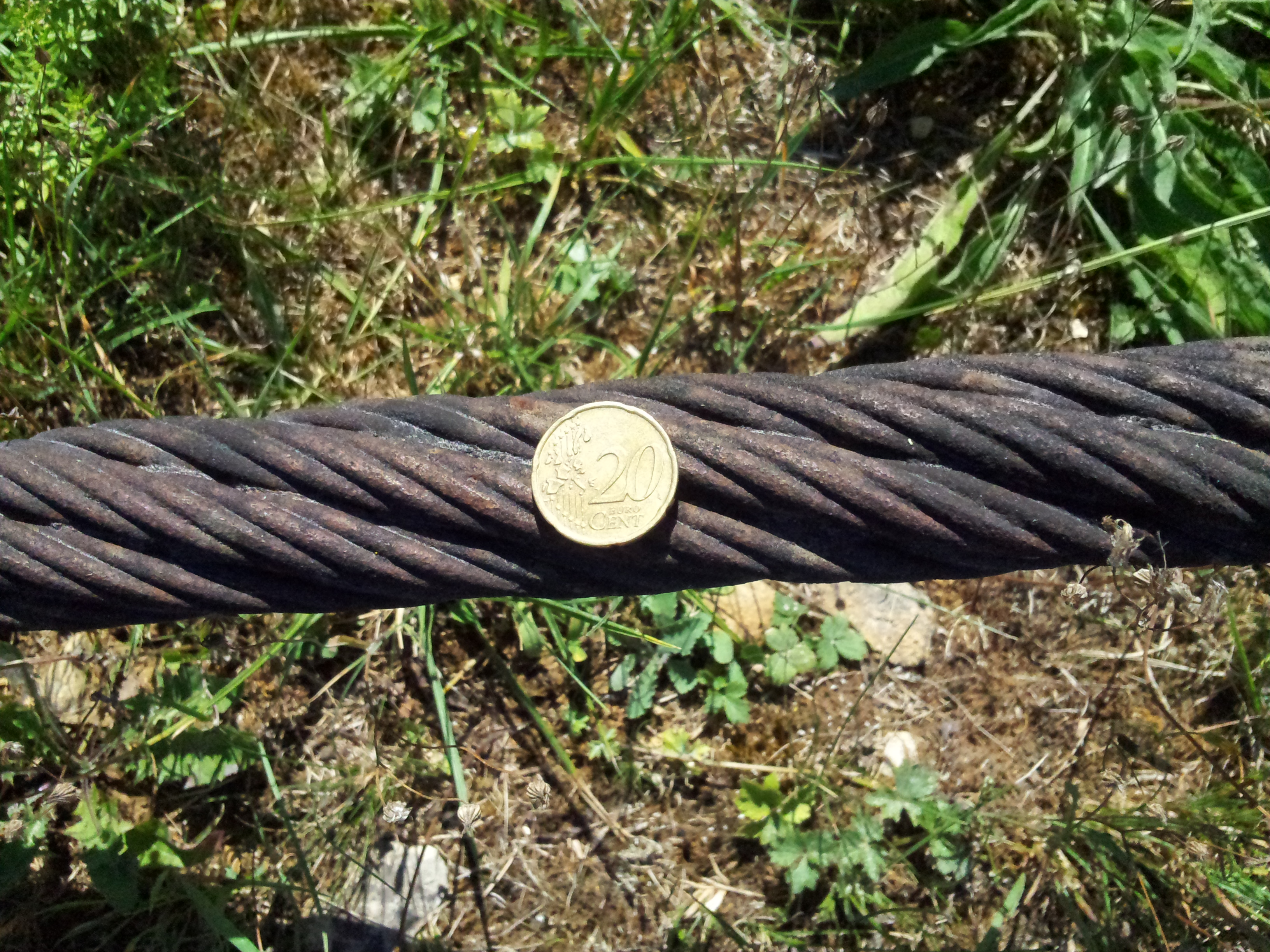 Taille d'un câble de l'ancien transporteur aérien Maxéville-Dombasle exposé à l'entrée de la carrière Solvay de Saint-Germain-sur-Meuse, comparé à une pièce de 20 centimes d'euros.